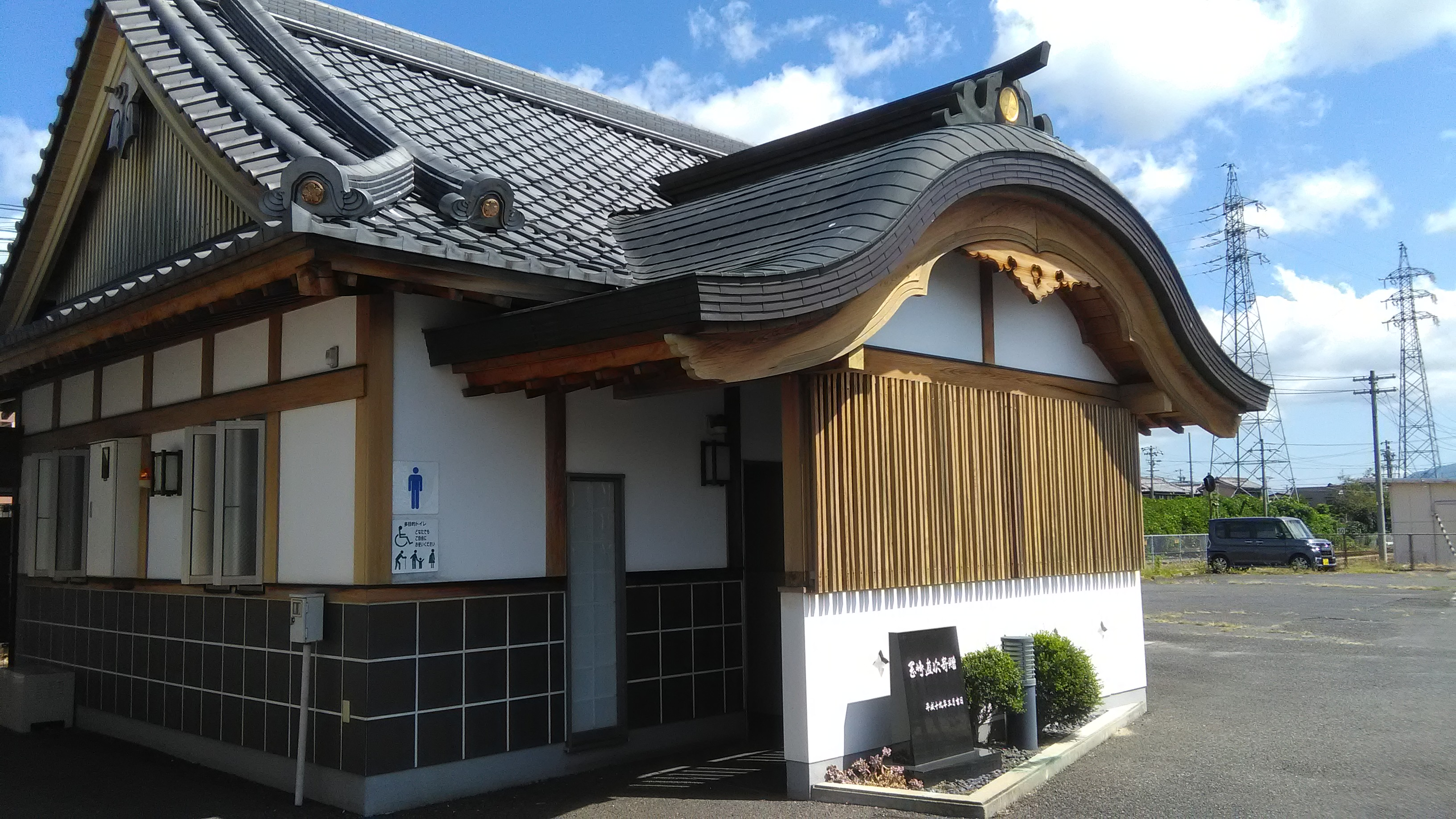 伊賀上野駅公衆便所（駅前ロータリー側から撮影）